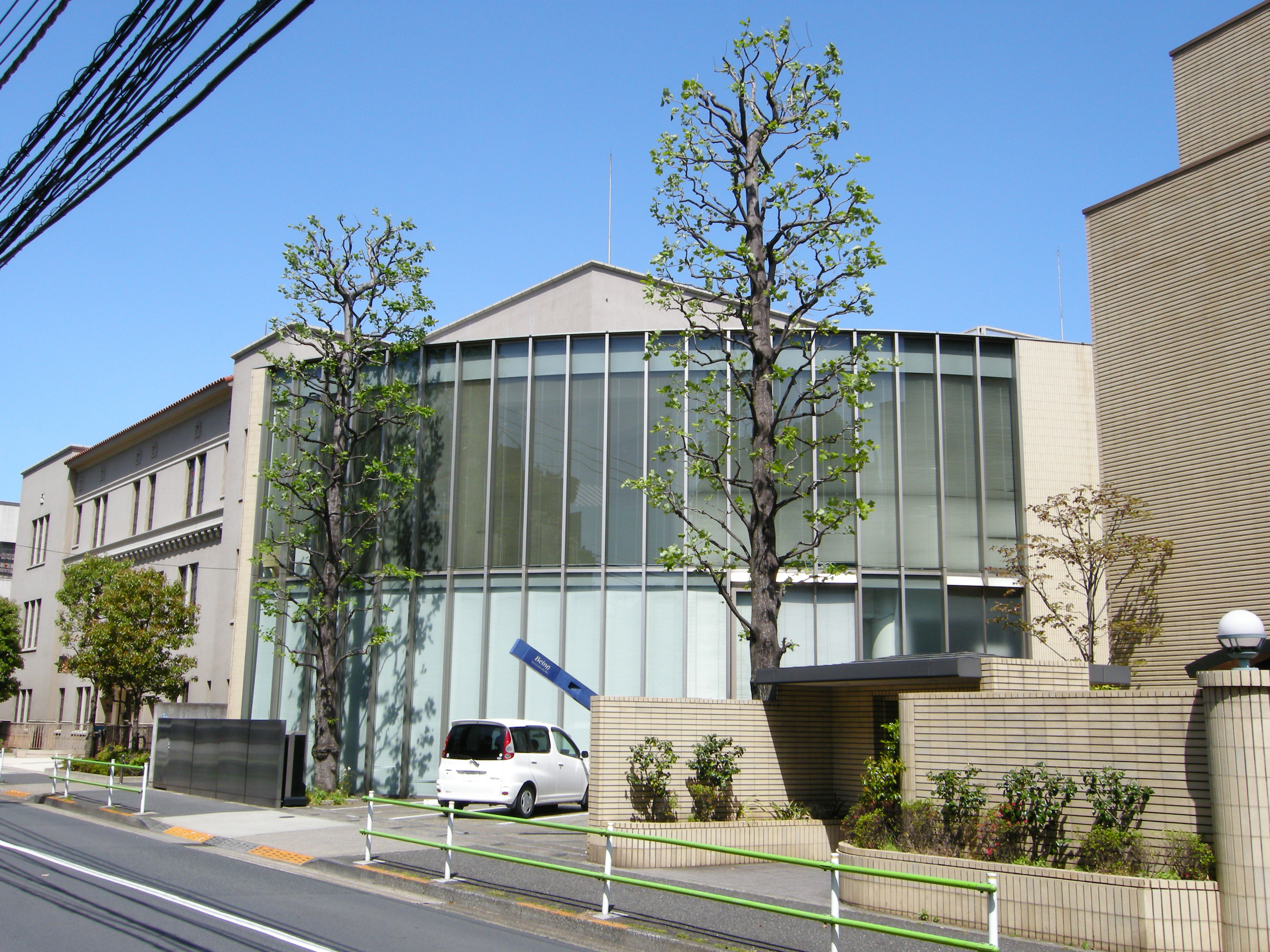 東京都六本木にあるビーイング鳥居坂ビルの写真。